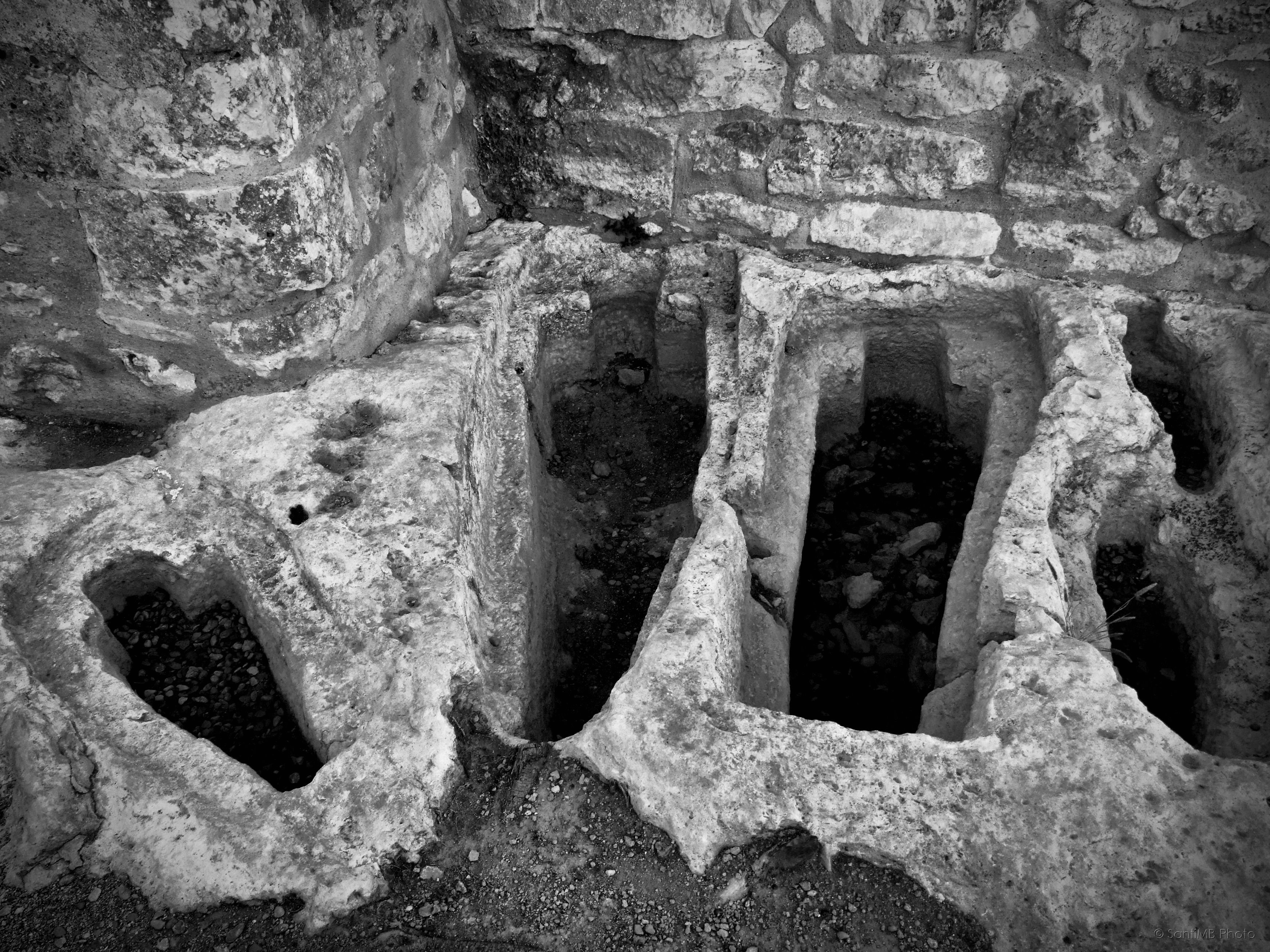 Església de Sant Miquel d'Olèrdola